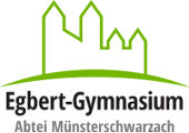 Logo Egbert-Gymnasium Münsterschwarzach, stilisierte Klosterkirche Münsterschwarzach